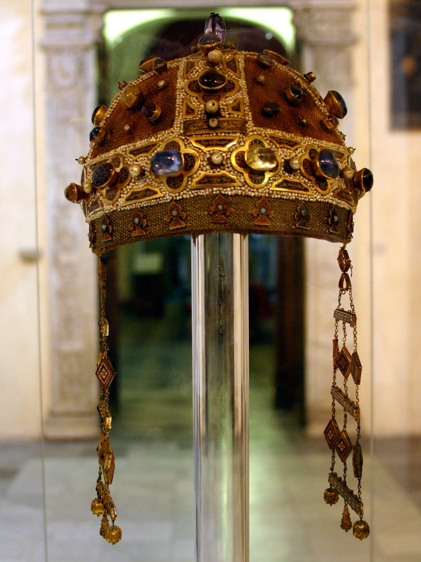 Cathedral of Palermo